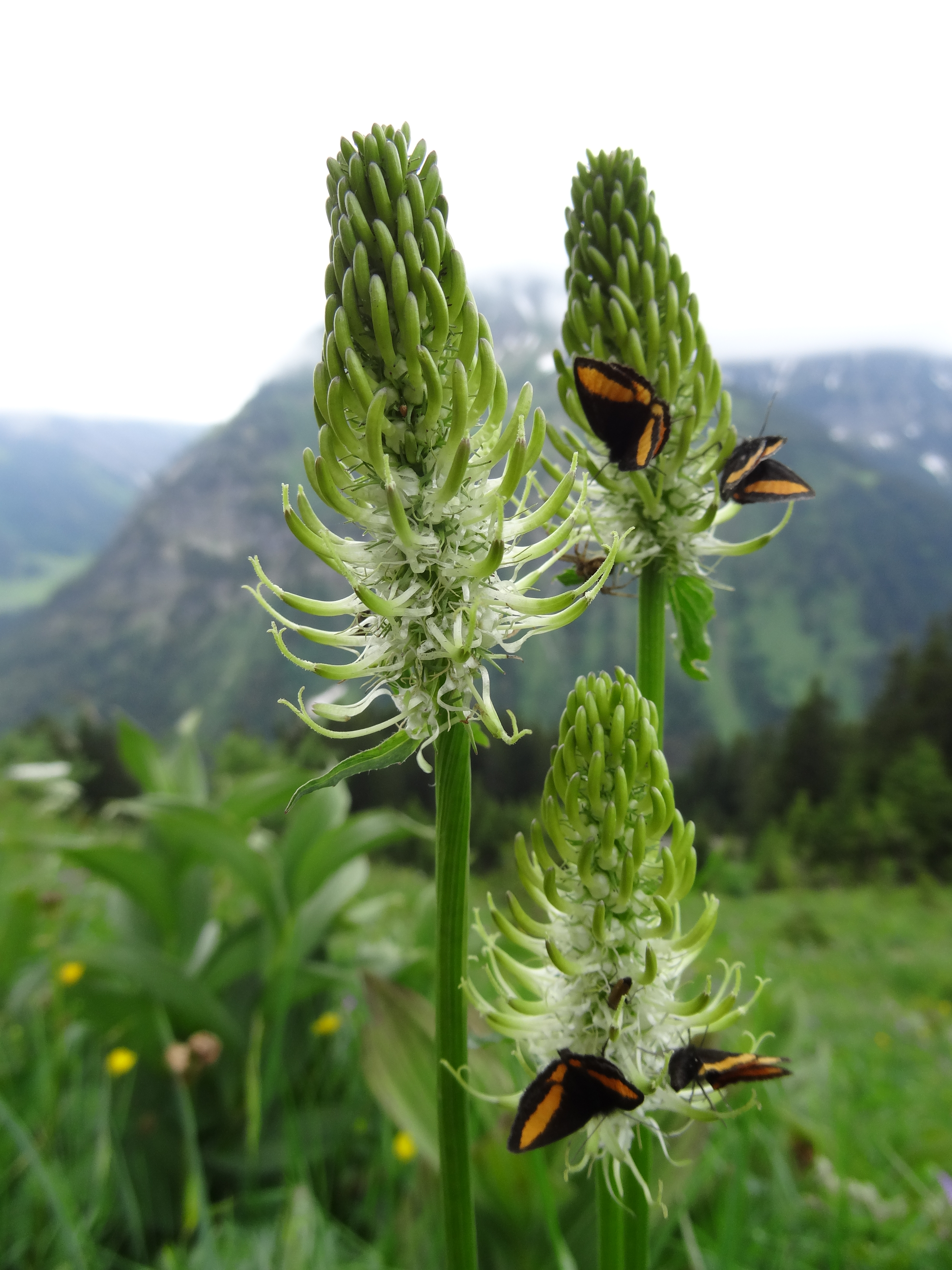 Campanulaceae, Ährige Rapunzel Österreich, Tirol, Kleinwalsertal, Mittelberg, 1500 m Photo: U.Schmidt, 22.VI.2012